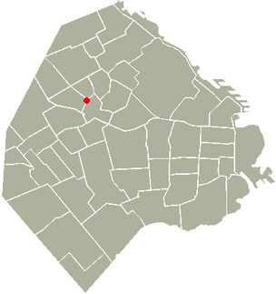 Túnel Chorroarín Constituyentes